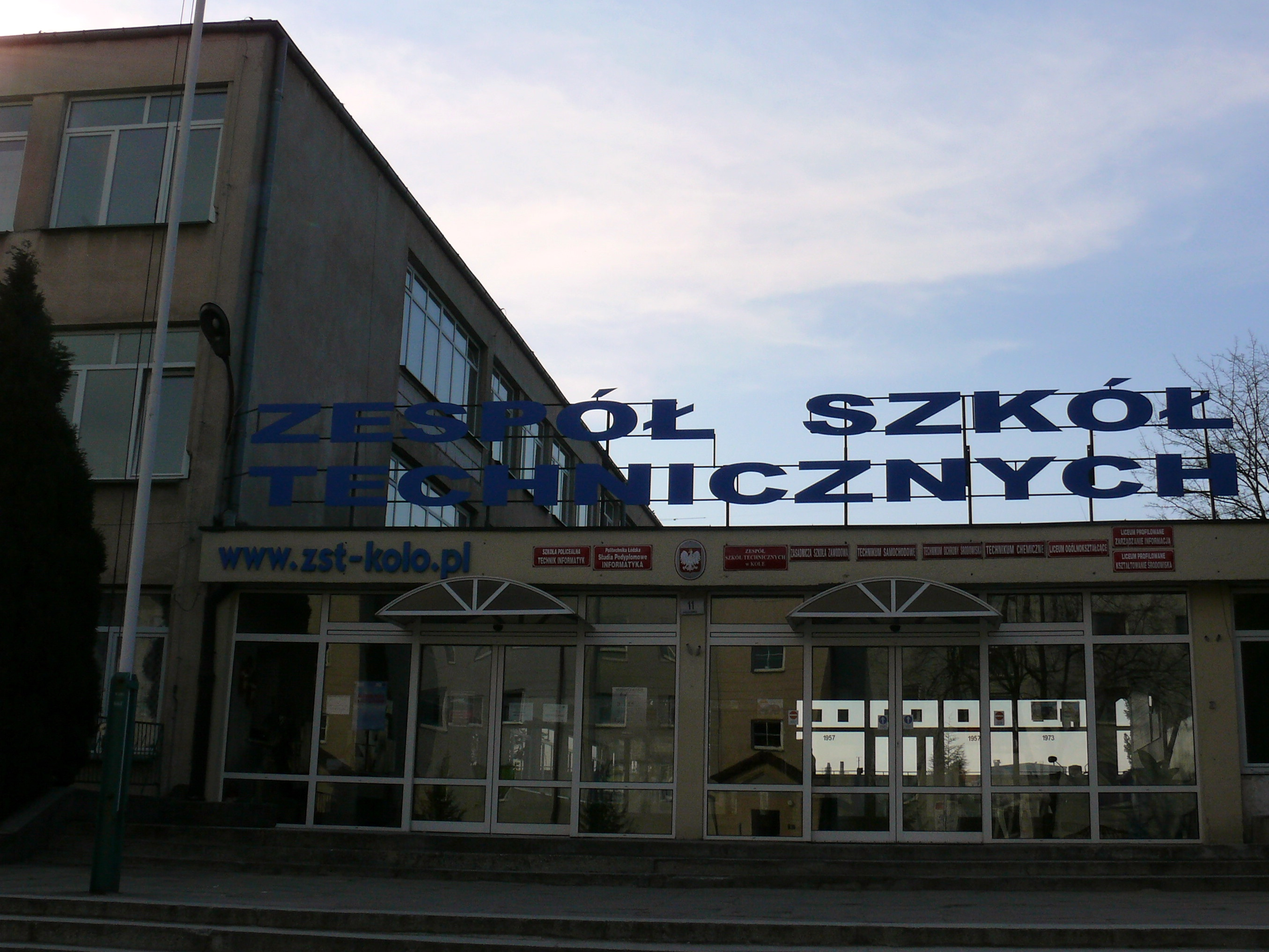 Zespół Szkół Technicznych w Kole